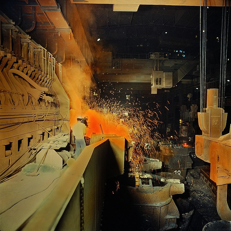 Original image description from the Deutsche FotothekMetallurge für Hüttentechnik